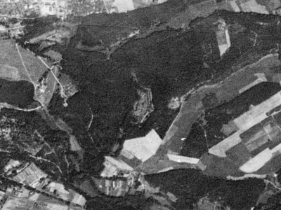 Fort III Twierdzy Poznań sfotografowany przez satelitę KH-4A 1023, 23 sierpnia 1965 r.